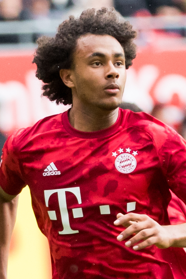 during 1.FC Kaiserslautern vs FC Bayern München at Fritz-Walter-Stadion, Kaiserslautern, Rheinland-Pfalz, Germany on 2019-05-27, Photo: Sven Mandel